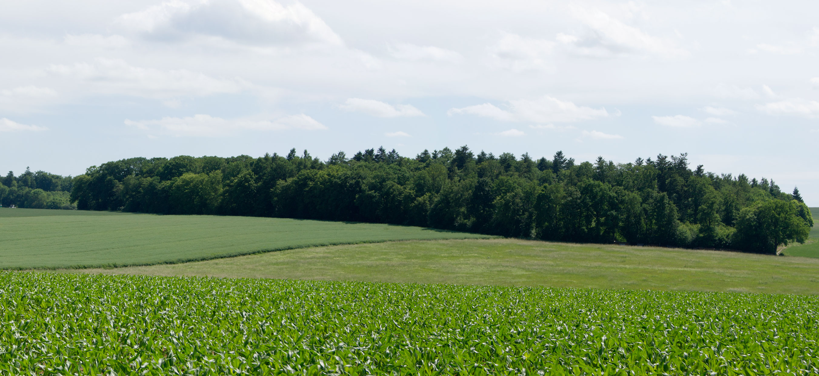 Panorama mit Blick auf den Zimmerwald vom Kranzberg aus.